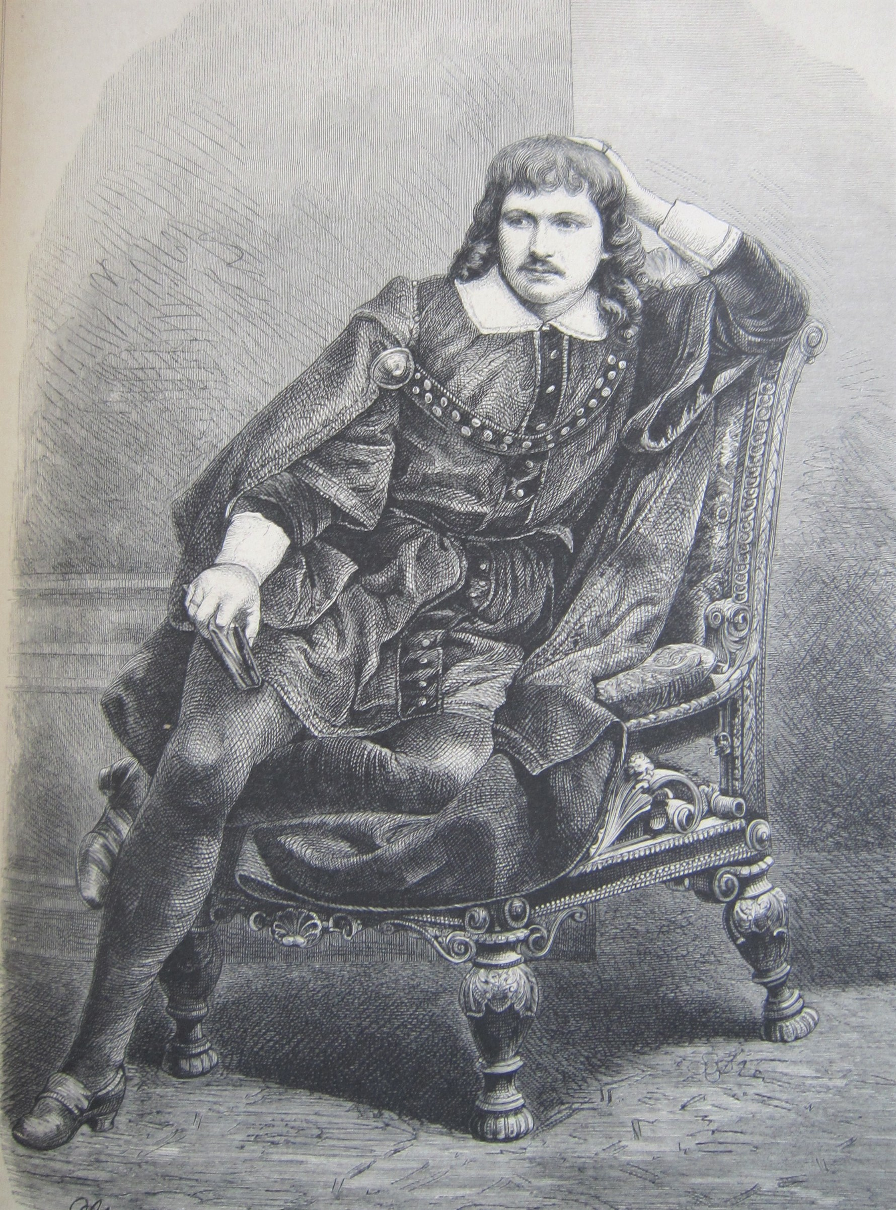 Bildnis des Schauspielers Siegwart Friedmann als Hamlet, auf Holz gezeichnet von Adolf Neumann